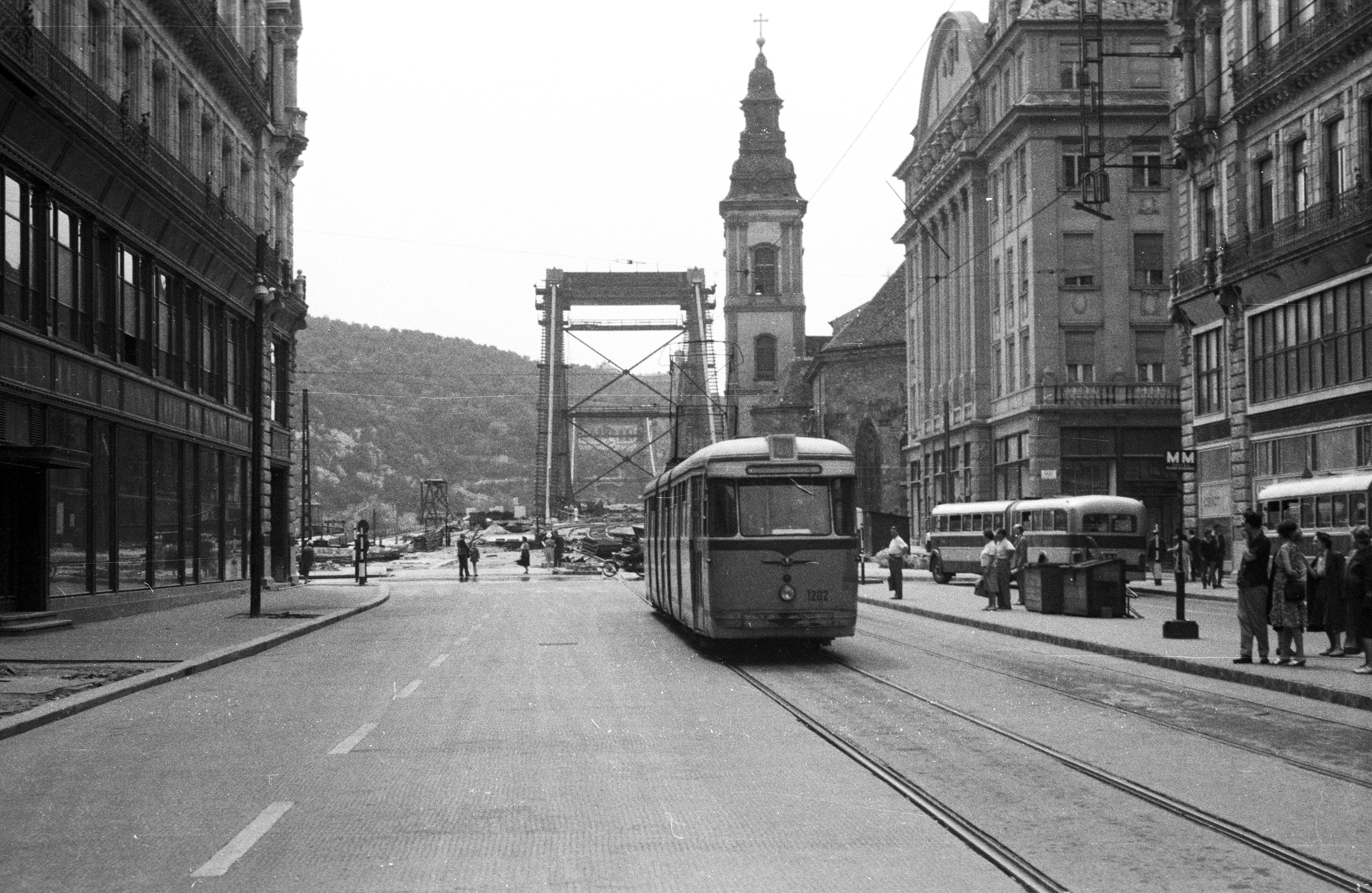 A Szabadsajtó út az épülő Erzsébet híd felé nézve, az előtérben egy tízajtós, 1202-es pályaszámú bengáli villamossal (Budapest)